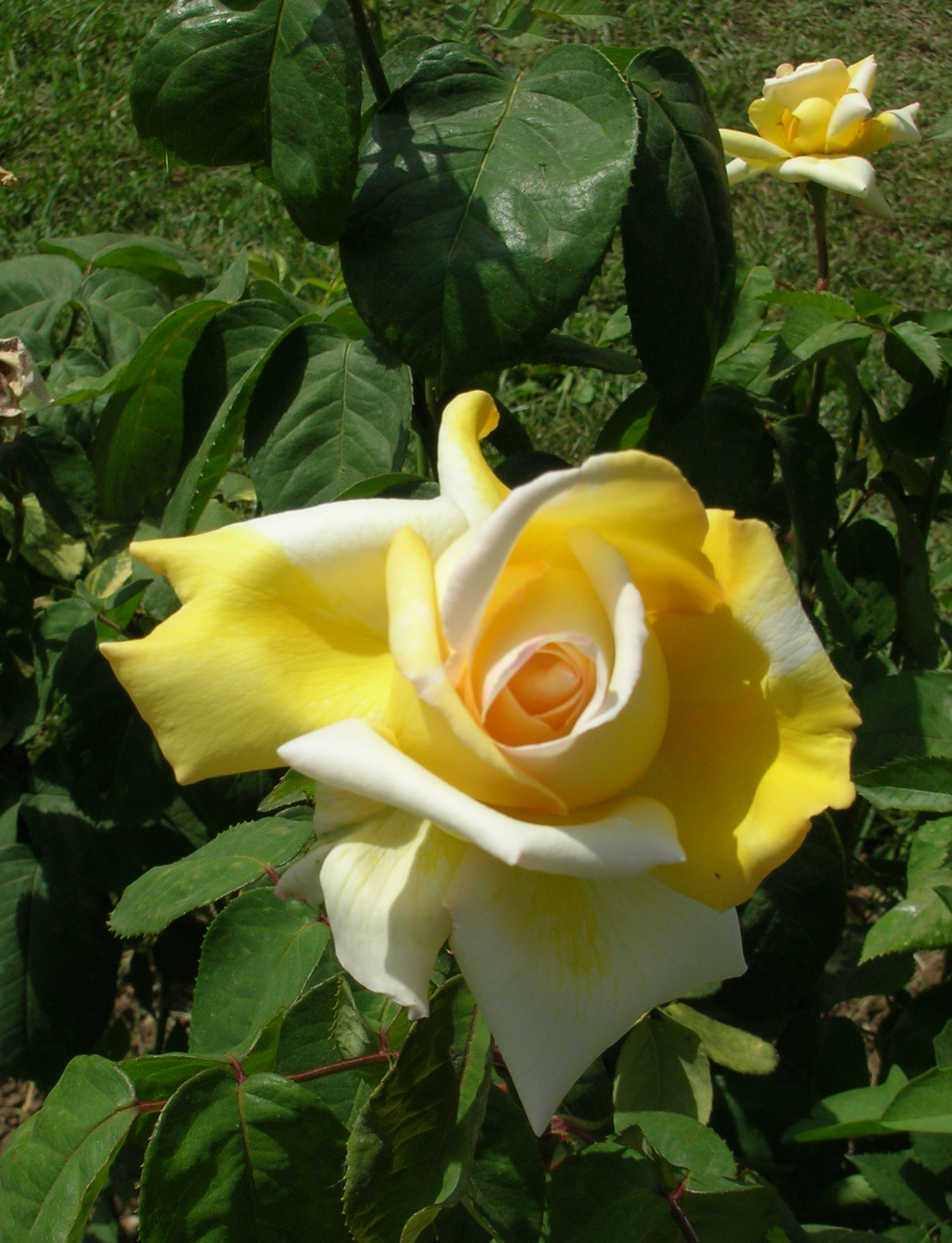 Rosa_Folle_courtisane - Delbard 1988 Francia